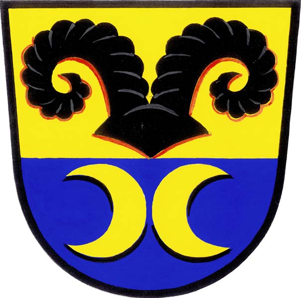 Znak obce Voděrady